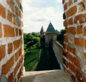 Вид из башни Орла